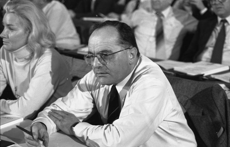 22.11.1987 51. CSU-Parteitag in der Bayernhalle in München.